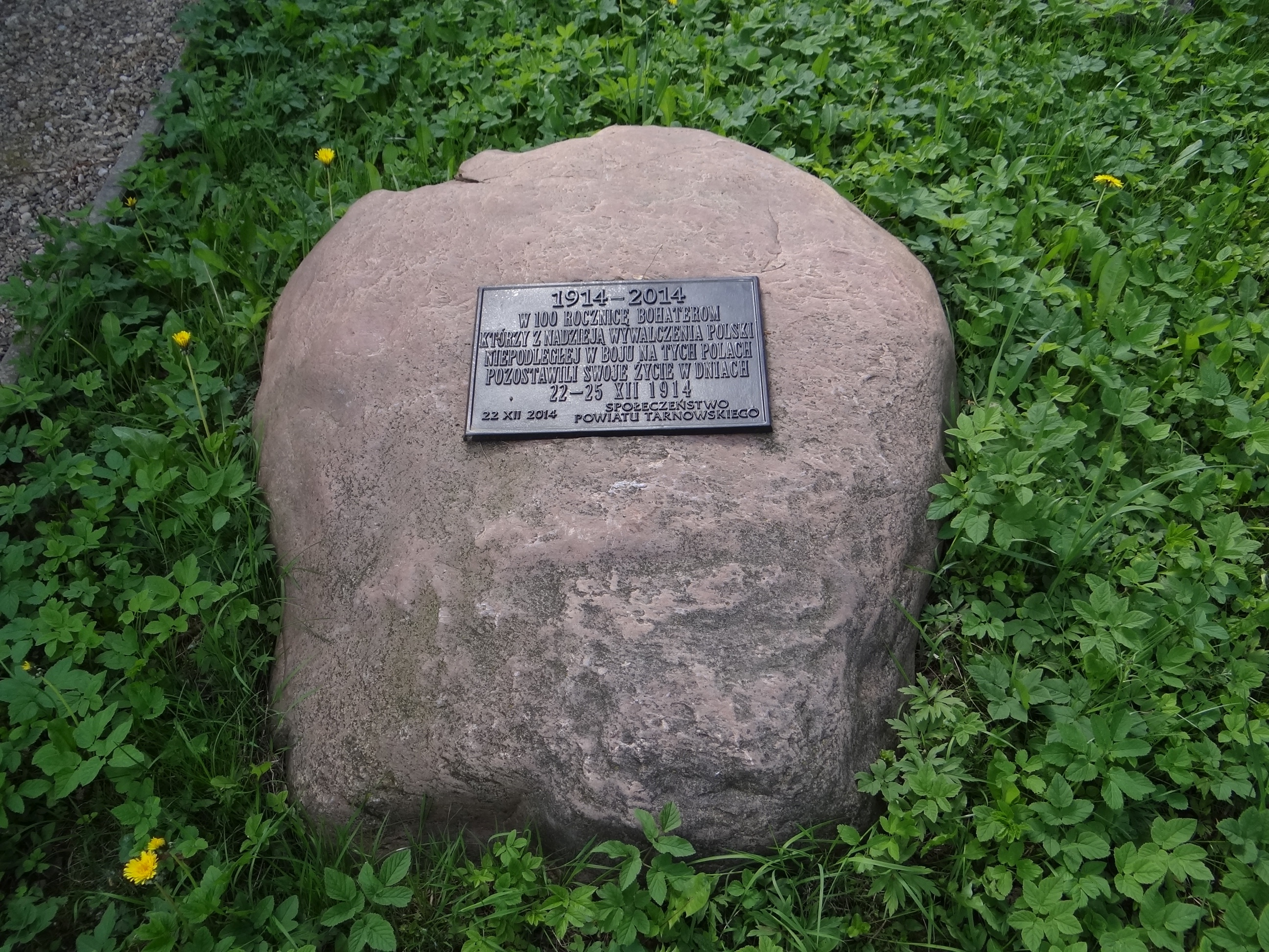 Cmentarz wojenny nr 171 – Łowczówek